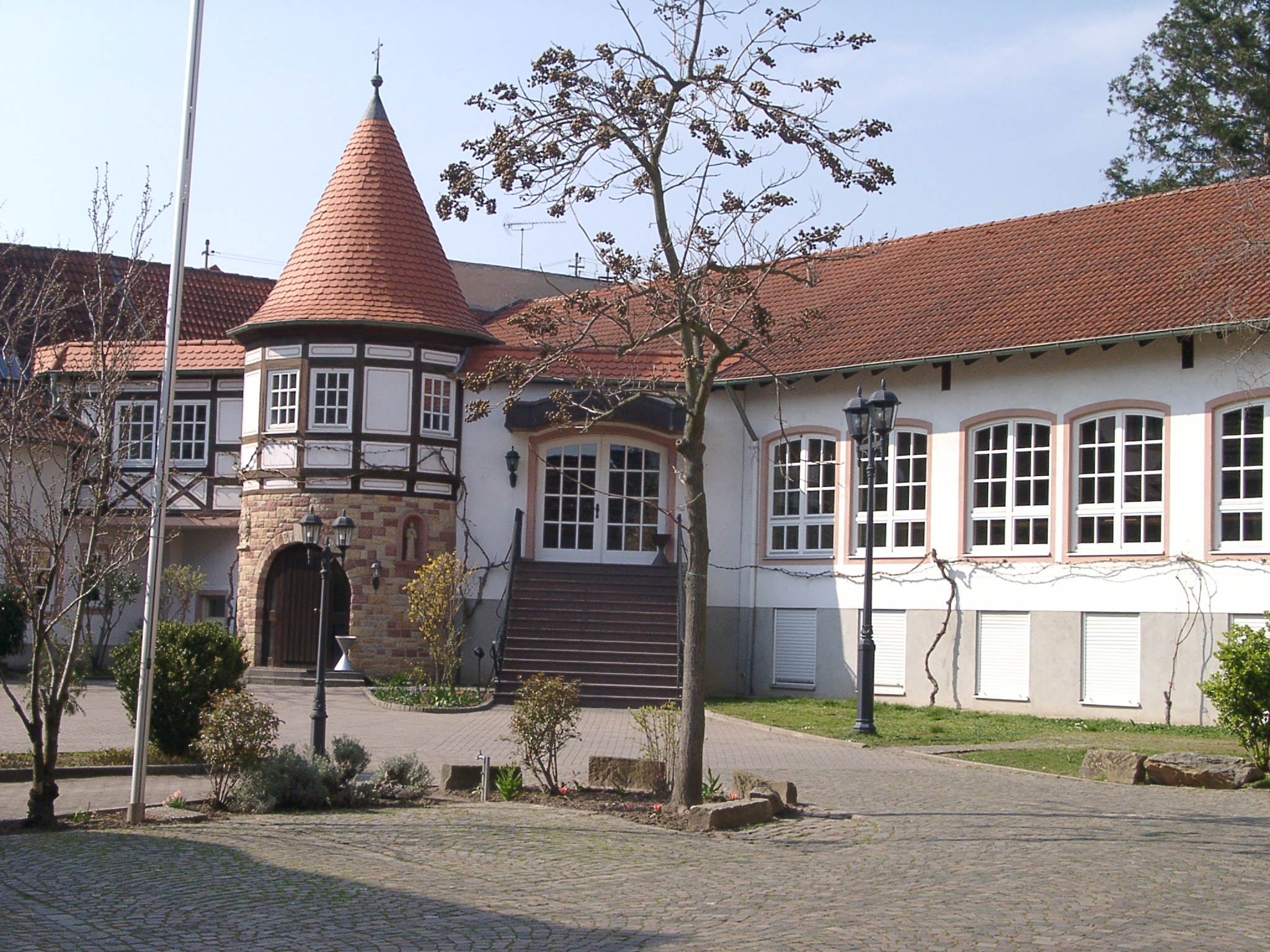 Das Pfarrheim der katholischien Kirchengemeinde in Deidesheim, der Bernhardushof